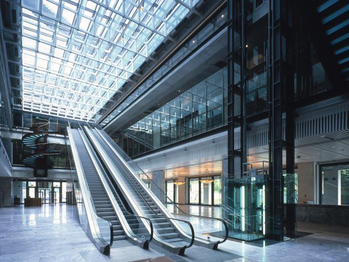 Centrum Gieˆłdowe w Warszawie